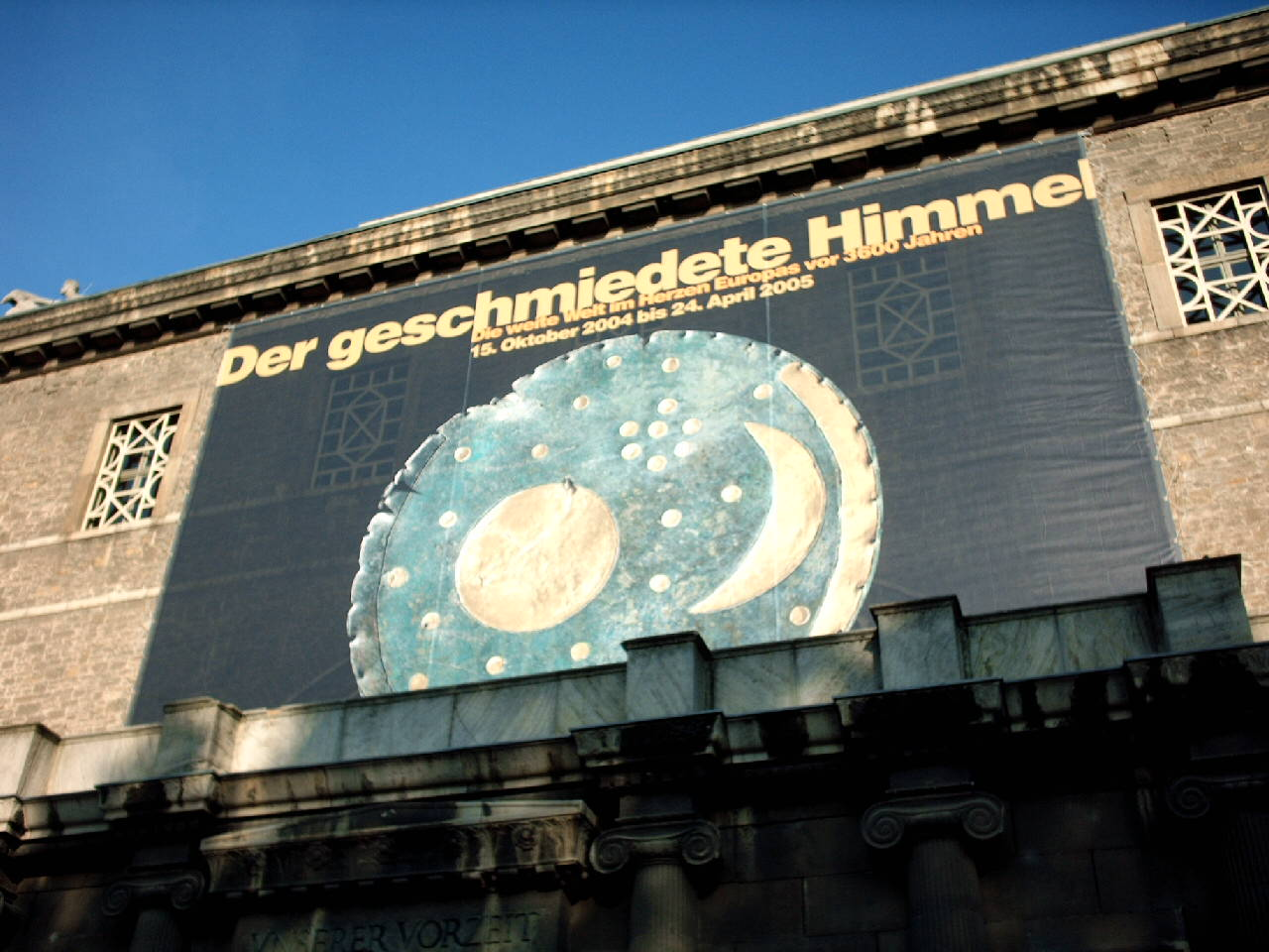 Ausstellungsplakat zu „Der geschmiedete Himmel“, Halle/Saale 2004/05